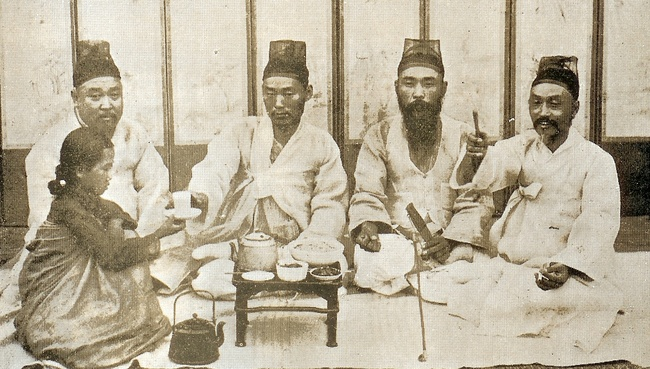 1910년대의 조선 기생 1890년~1910년 서울 시내의 기생집에서 볼수 있는 풍경이다. 술마시는 장년 남성 4명과 시중을 드는 10대 초반의 여기생이 있다.